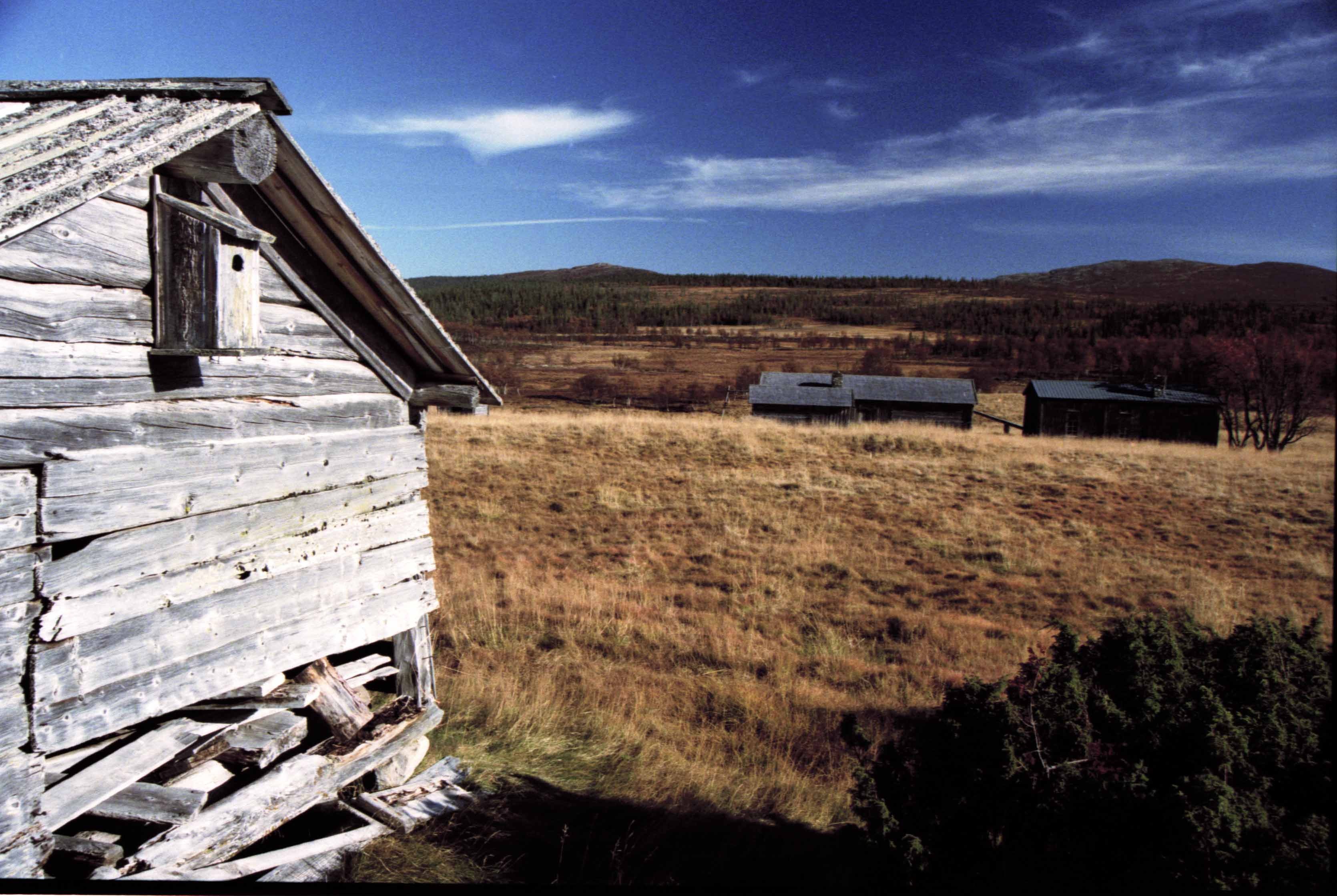 Vy över kläppen i Henvålens naturreservat i Härjedalen. Särvfjället syns i bakgrunden.